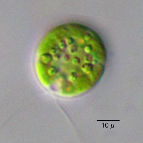 Chlamydomonas globosa - 400x